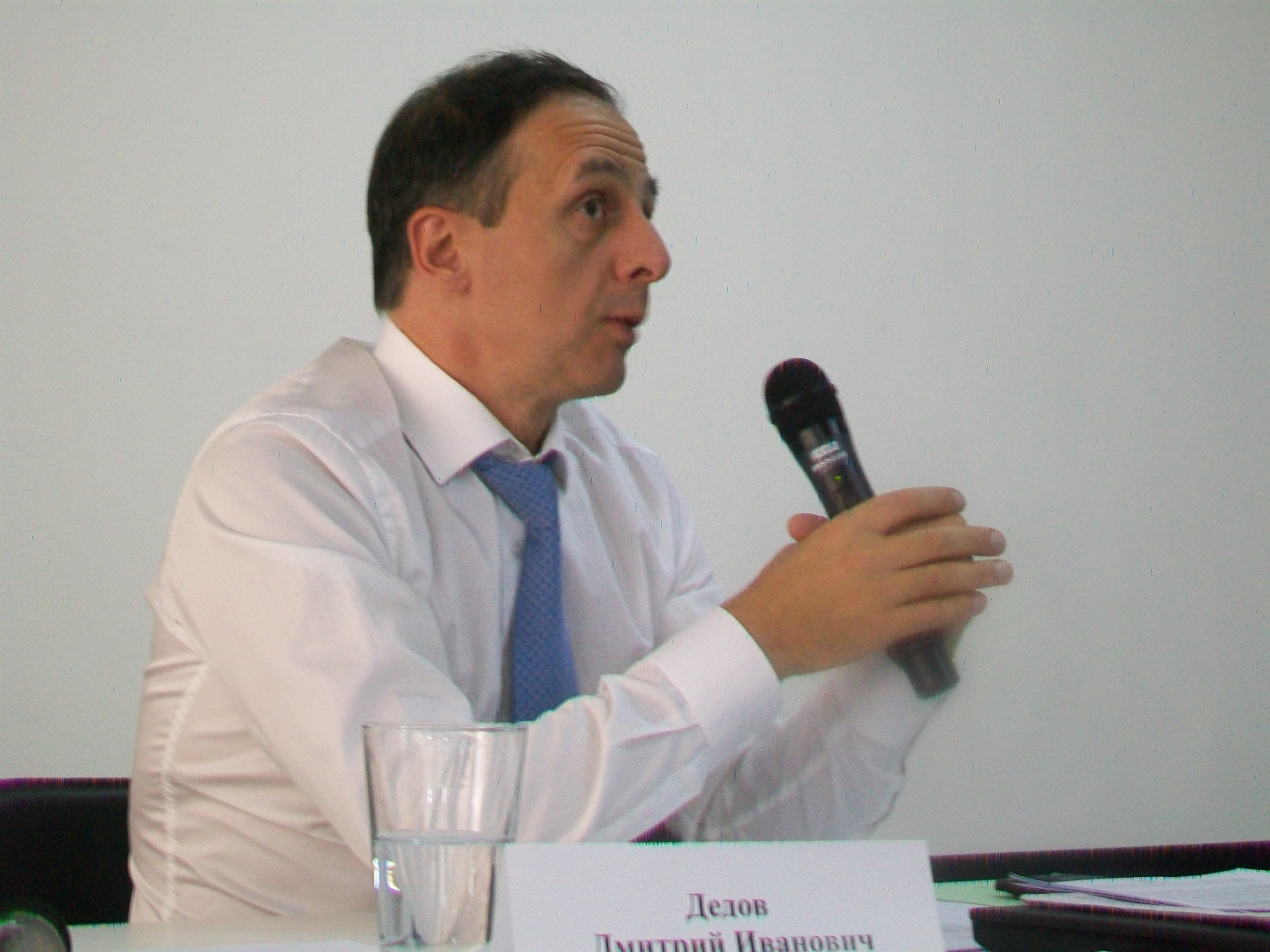 Дмитрий Дедов в Ельцин-центре. 26 октября 2017 года